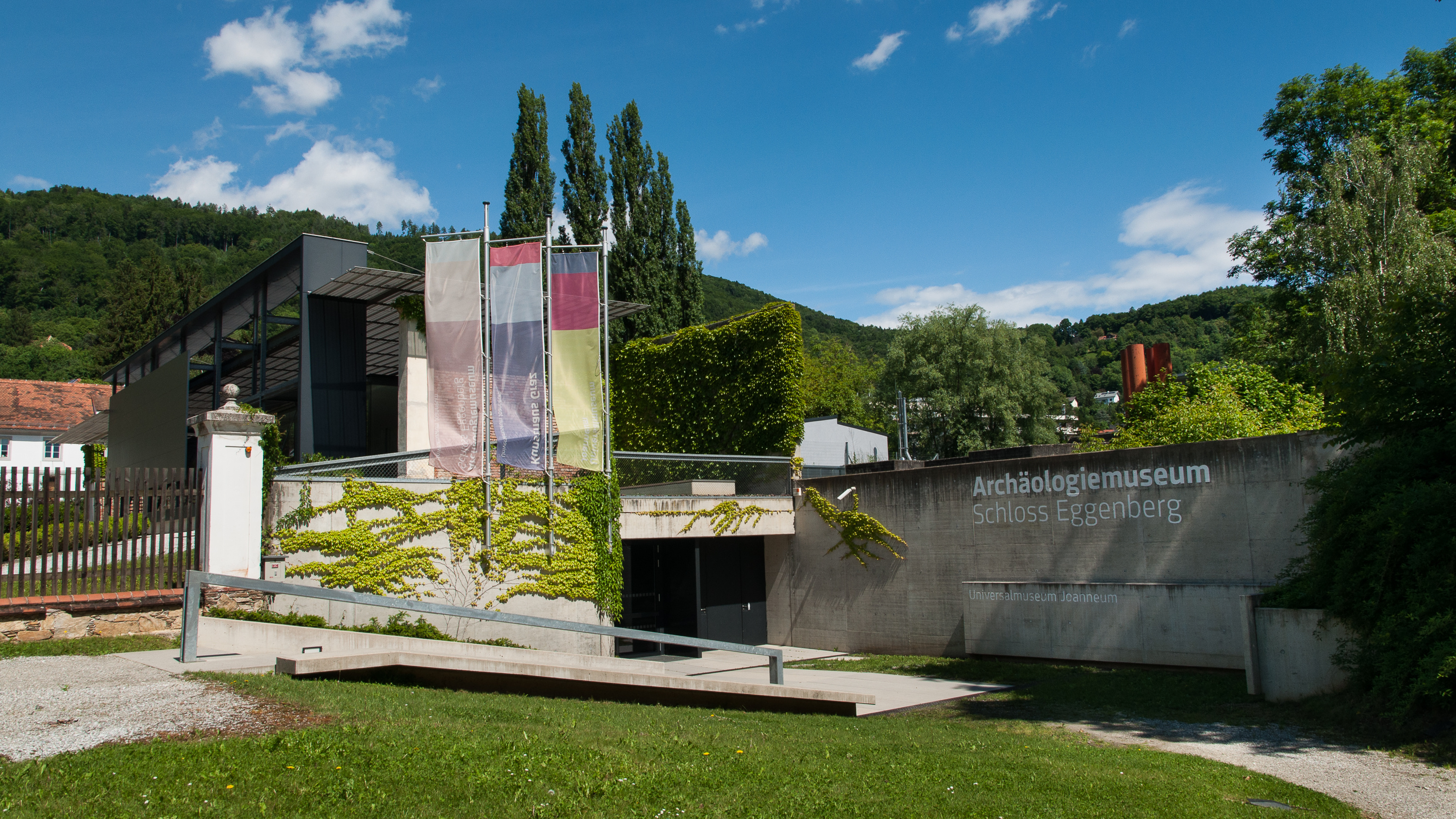 Archäologiemuseum des Universalmuseums Joanneum im Schlosspark von Schloss Eggenberg, Graz, Österreich.